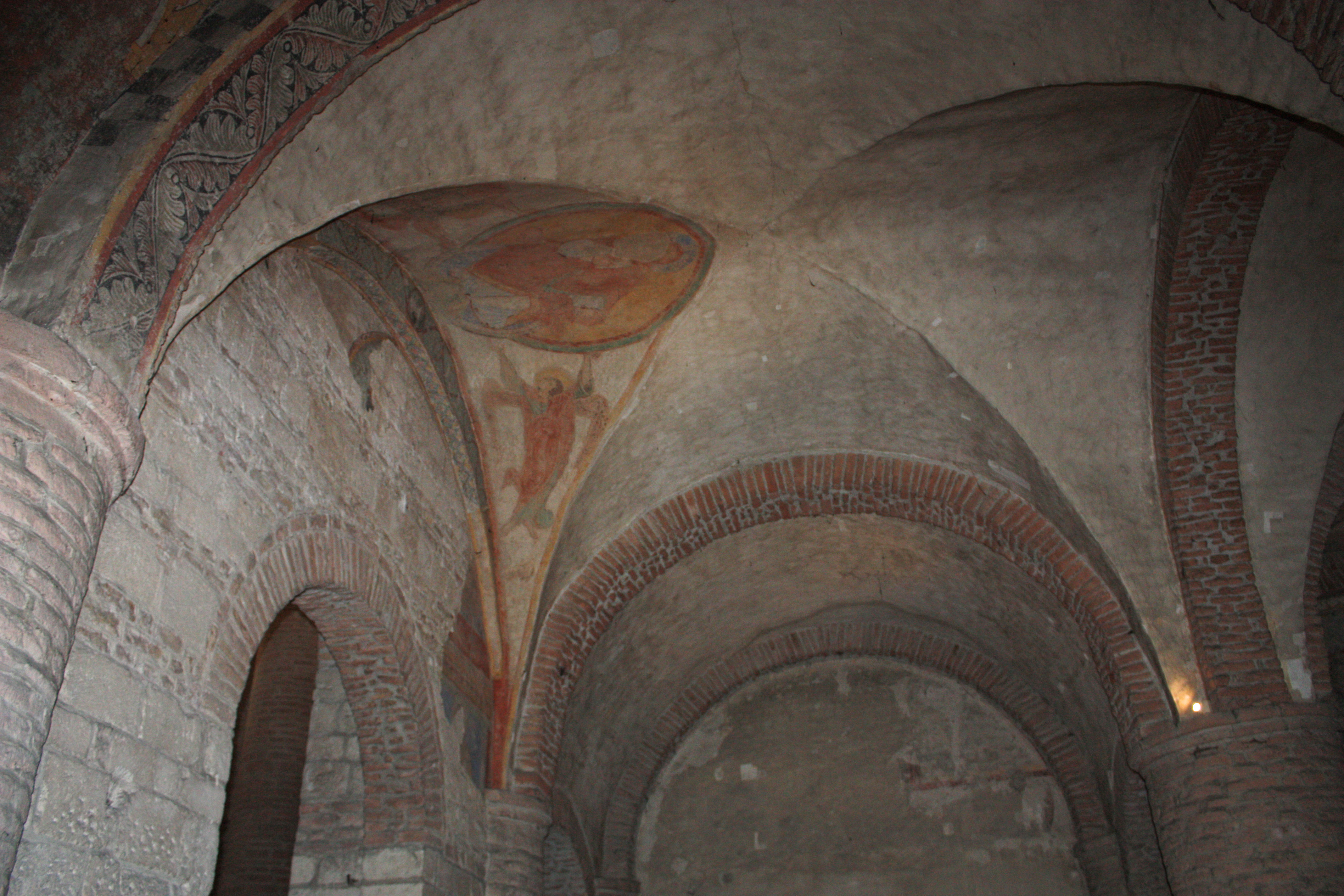 Voûtes du narthex